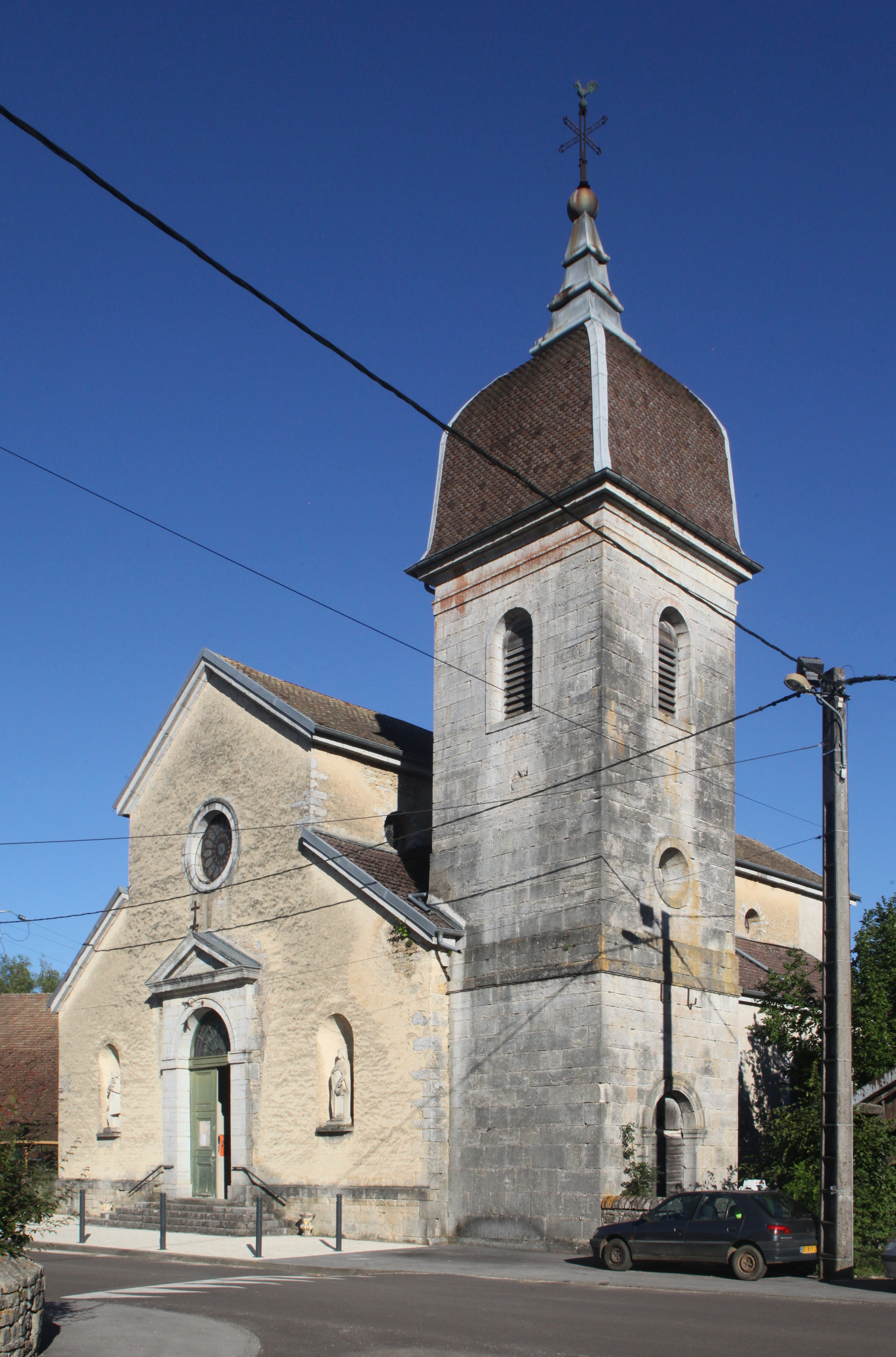 Église de Glamondans (Doubs).